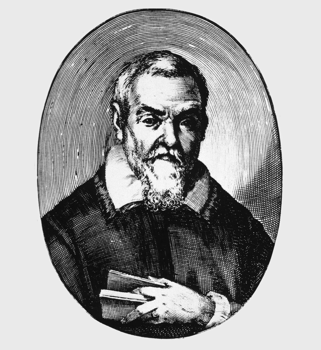 Portrait Sanctorius